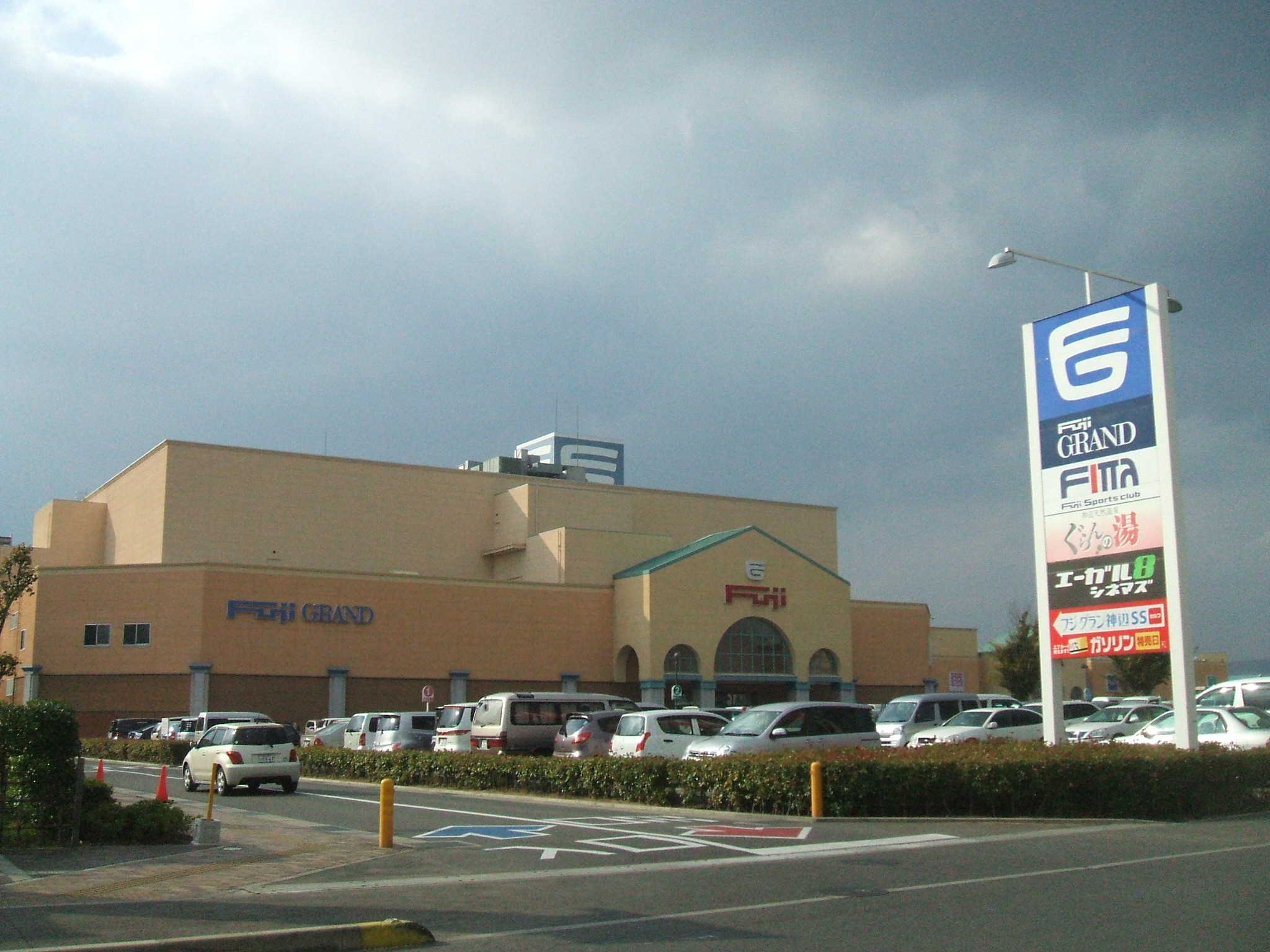 広島県福山市神辺町にあるフジグラン神辺の外観